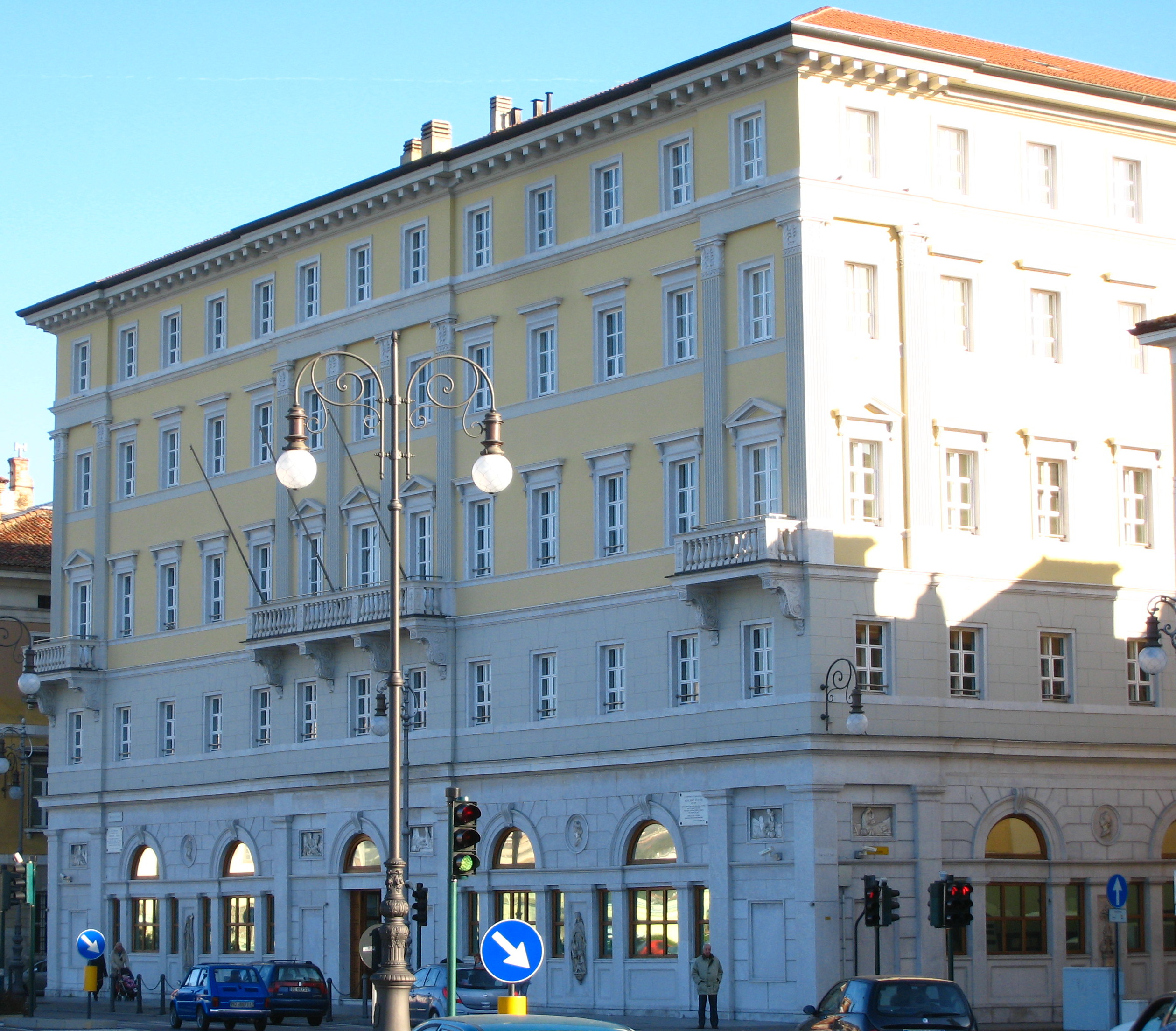 Sede della Fincantieri a Trieste. Dicembre 2007